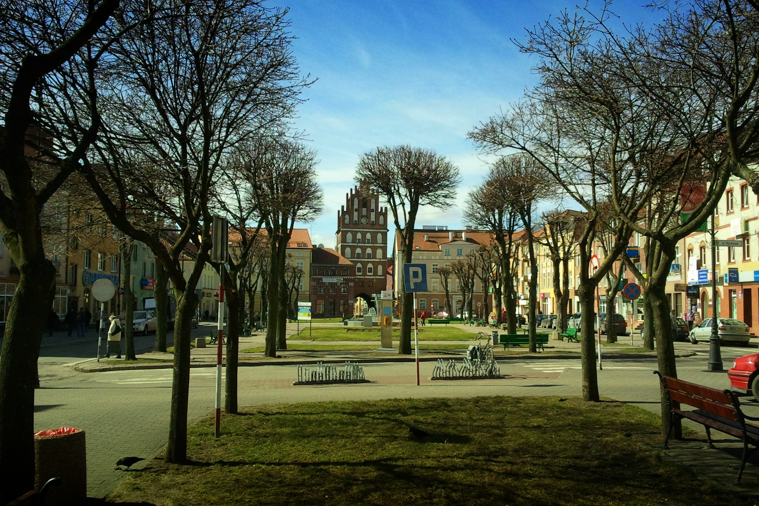 Bartoszyce